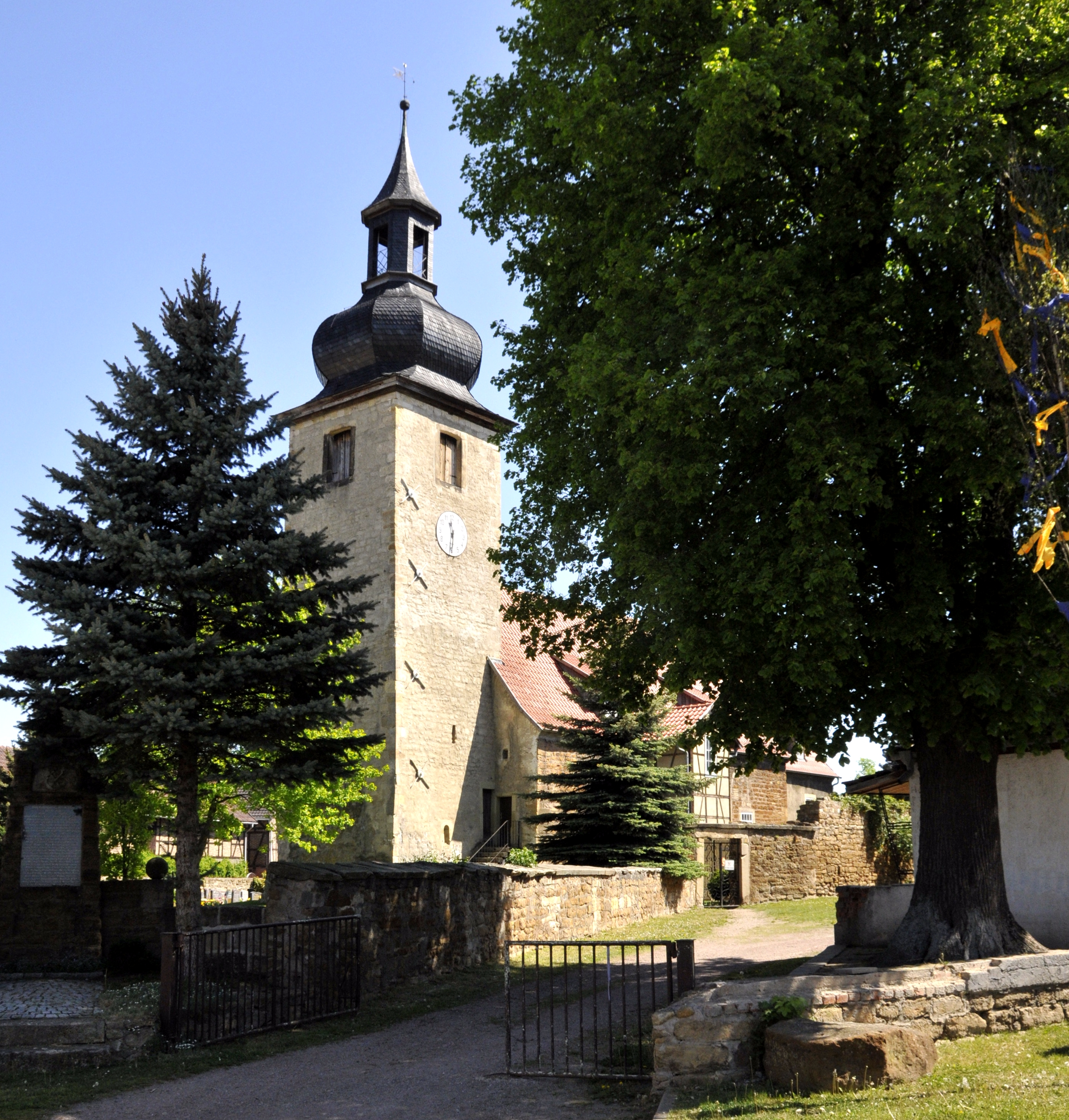 Sülzenbrücken, Wachsenburggemeinede, Thüringen, Dorfkirche St. Wigberti